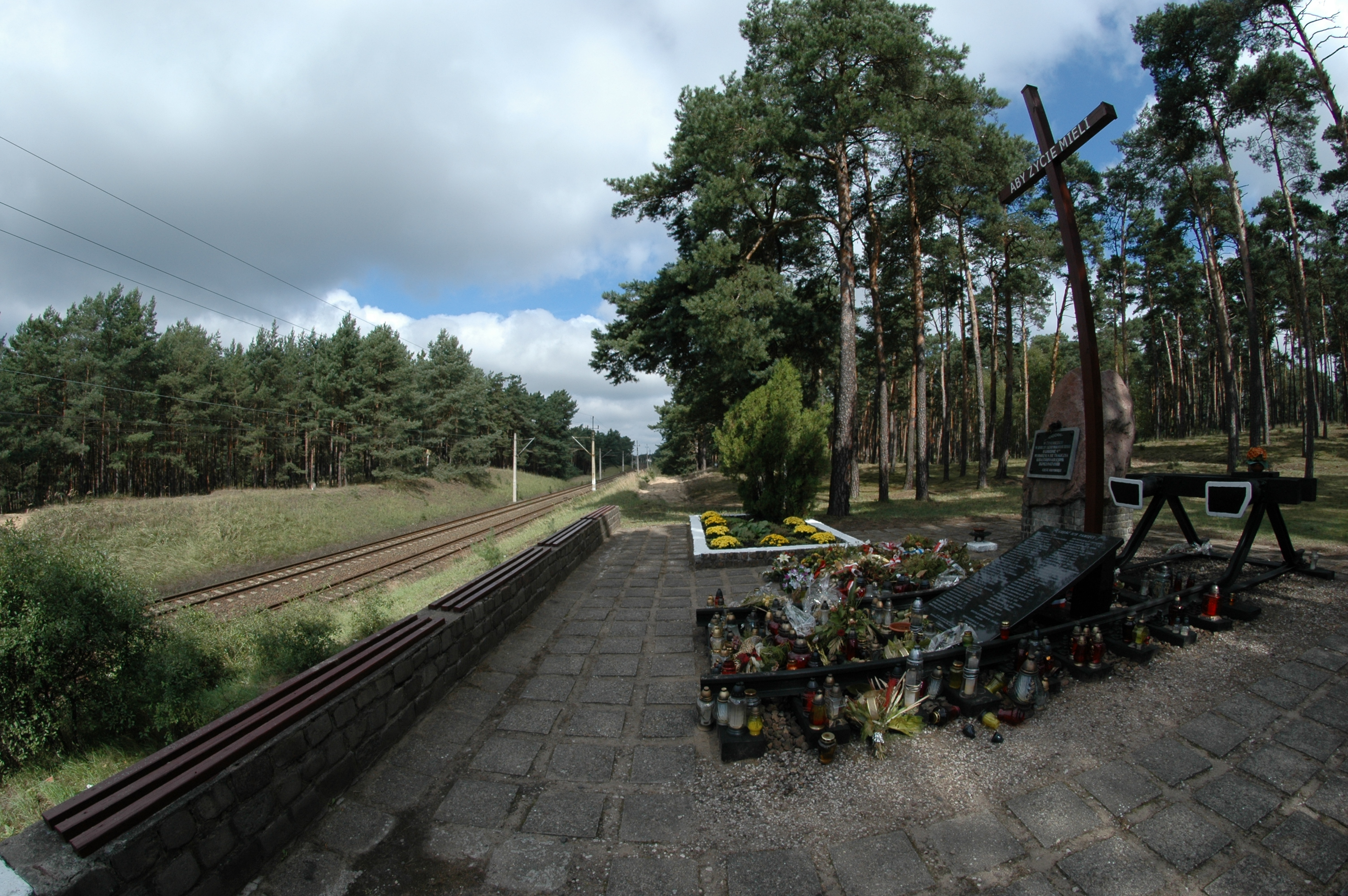 Pomnik upamiętniający katastrofę kolejową, która wydarzyła się w 1980. Szlak kolejowy Otłoczyn - Brzoza Toruńska